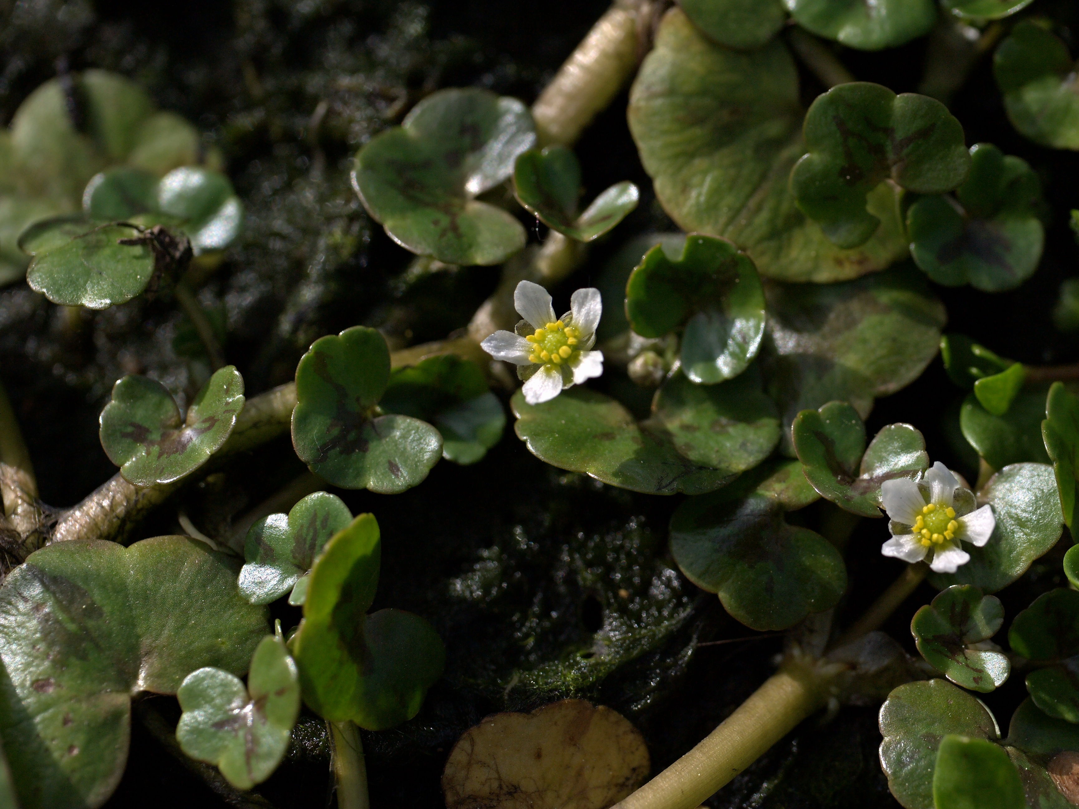 Ranunculus hederaceus Der Efeublättrige Wasserhahnenfuß (Ranunculus hederaceus L.) wächst im atlantischen Bereich Westeuropas an Quellfluren und Gräben, sowie an kleinen Fließgewässern. Bevorzugt wird basenarmes, sauberes bis höchstens mäßig nährstoffbelastetes Wasser. Die Art gilt als kurzlebige und konkurrenzschwache Frühjahrspflanze. Sie blüht ab Ende März und wird oft schon im Juli als Ganzes hinfällig. In Belgien gilt die Art als "gefährdet". Auf der Roten Liste Deutschlands wird sie als „stark gefährdet“ eingestuft, in vielen Bundesländern sogar als „vom Aussterben bedroht“ oder bereits ausgestorben. Panasonic GF1 + Leica DG Macro-Elmarit 45mm F2.8 ASPH OIS